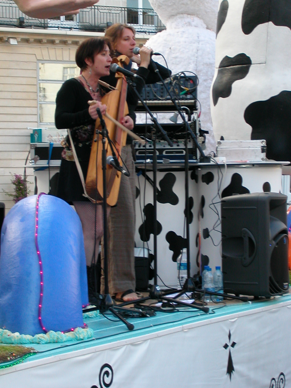 Joueuse de gardon lors de la Fest' Yves 2008 à Nantes